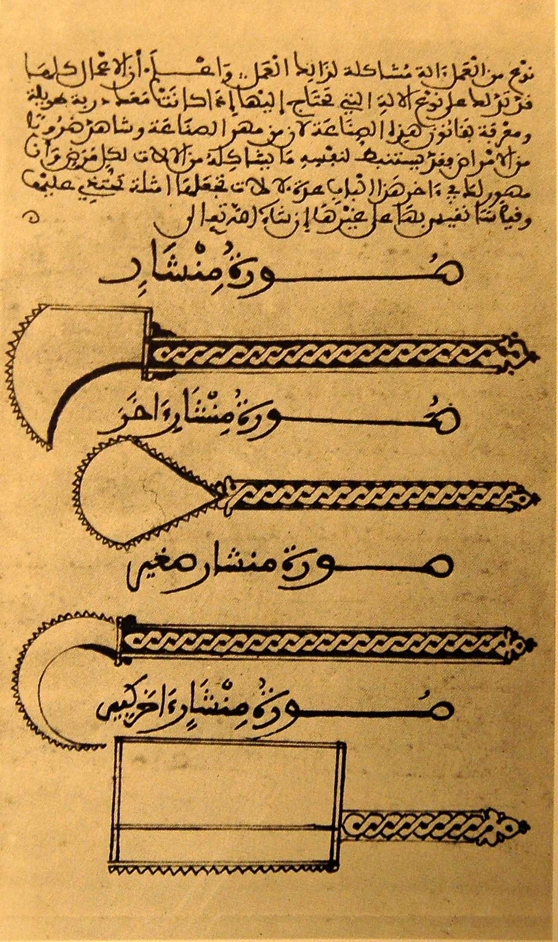 Lukisan dari peralatan kedokteran pada masa Al-Andalus.